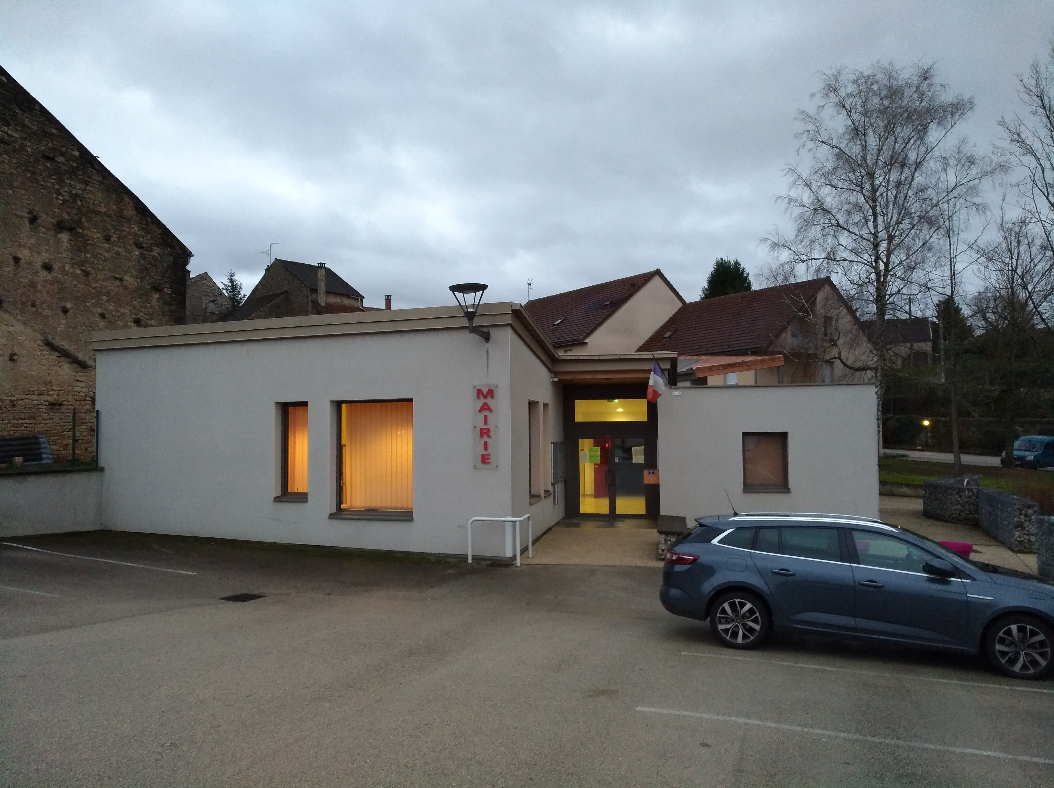 Sampans (Jura, France) en janvier 2018.